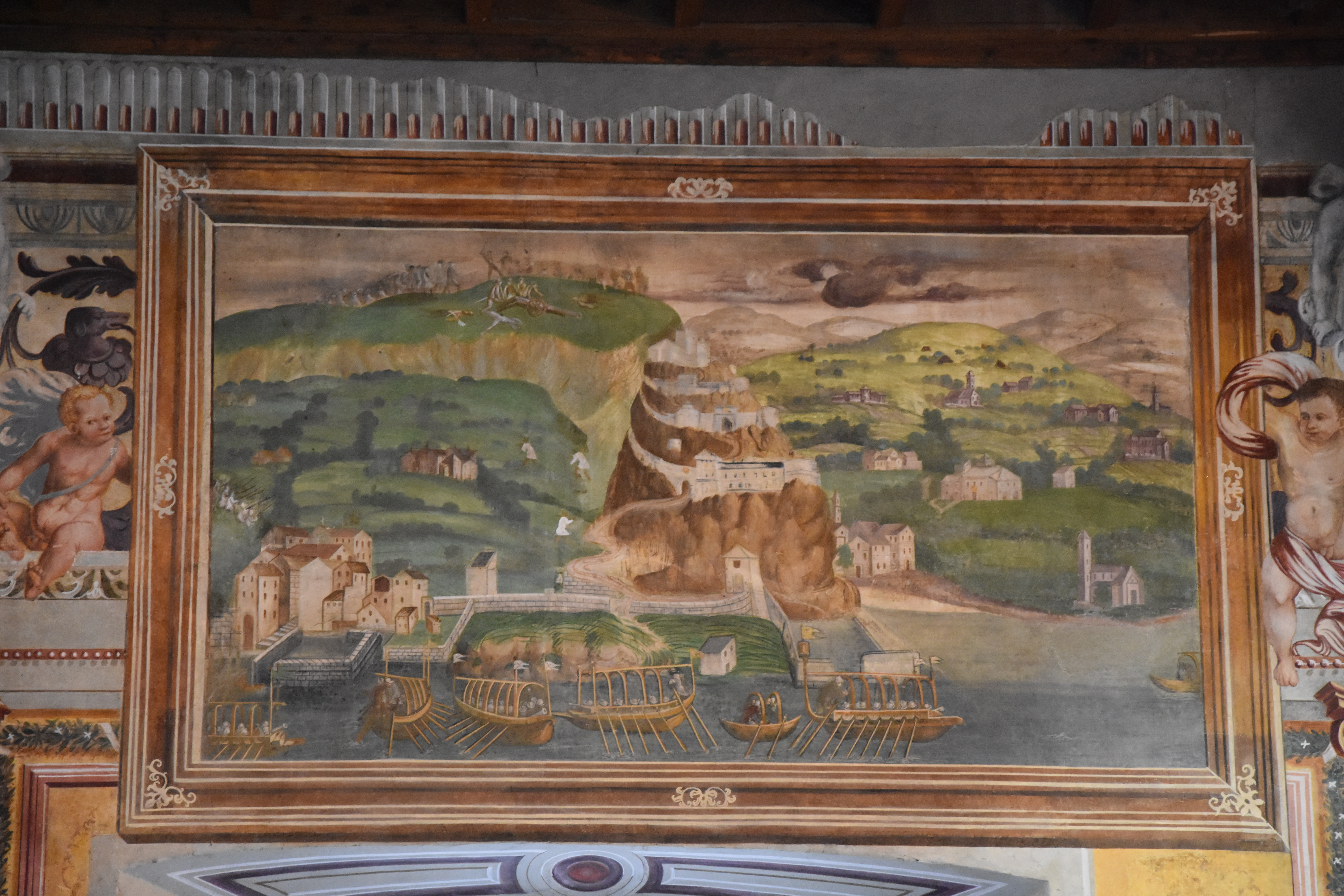 Castello di Melegnano, sala delle battaglie, affreschi cinquecenteschi.